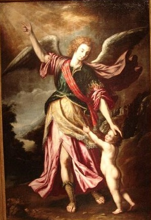 La obra representa al Ángel de la Guarda acompañando a un niño al que protege.